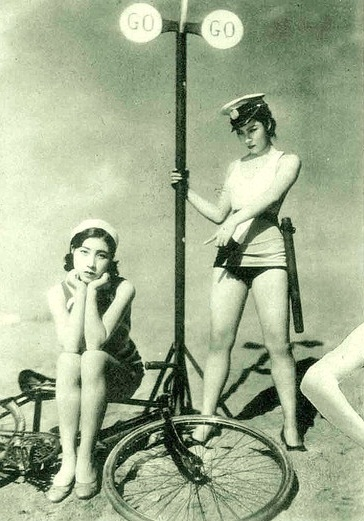 桂珠子、山路ふみ子、1930年代の雑誌写真